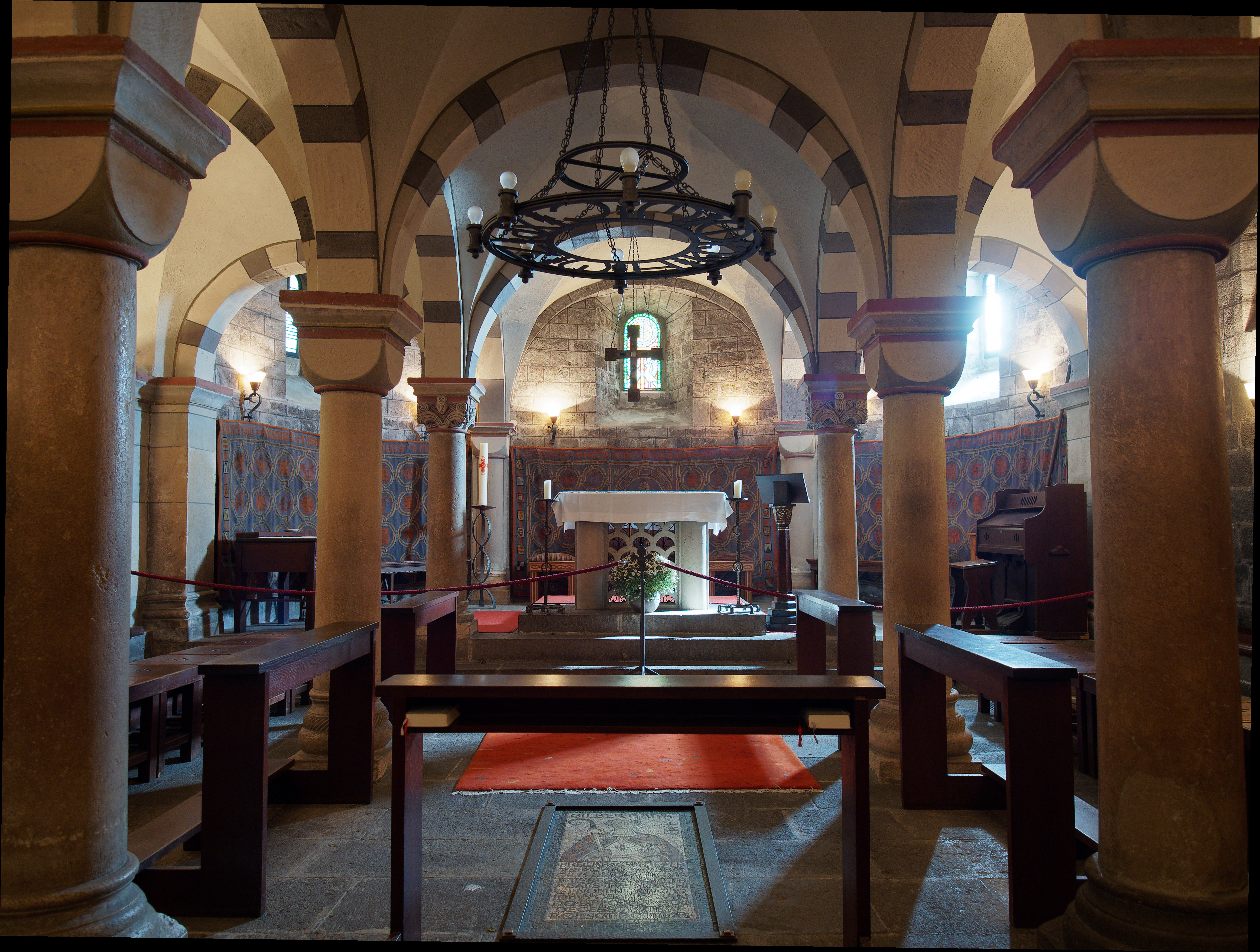 Krypta in der Abteikirche Maria Laach. Glees (RP), Denkmalzone Maria Laach.